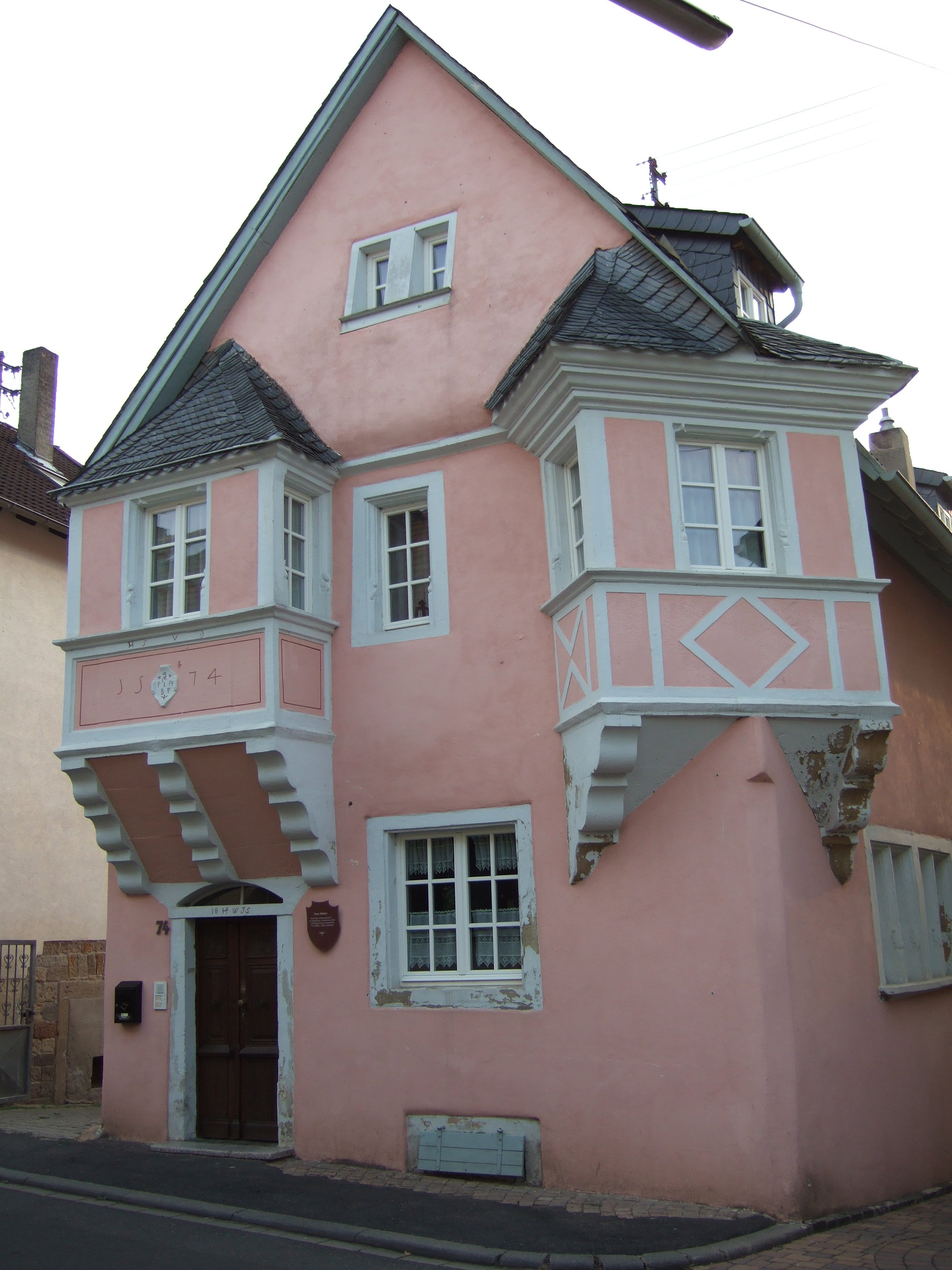 Haus Weber, Monzingen